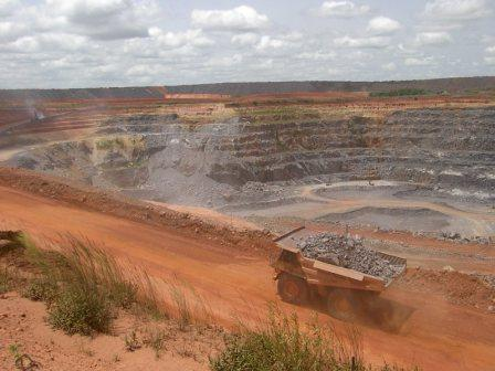 Mine d'Or de MORILA (Mali)